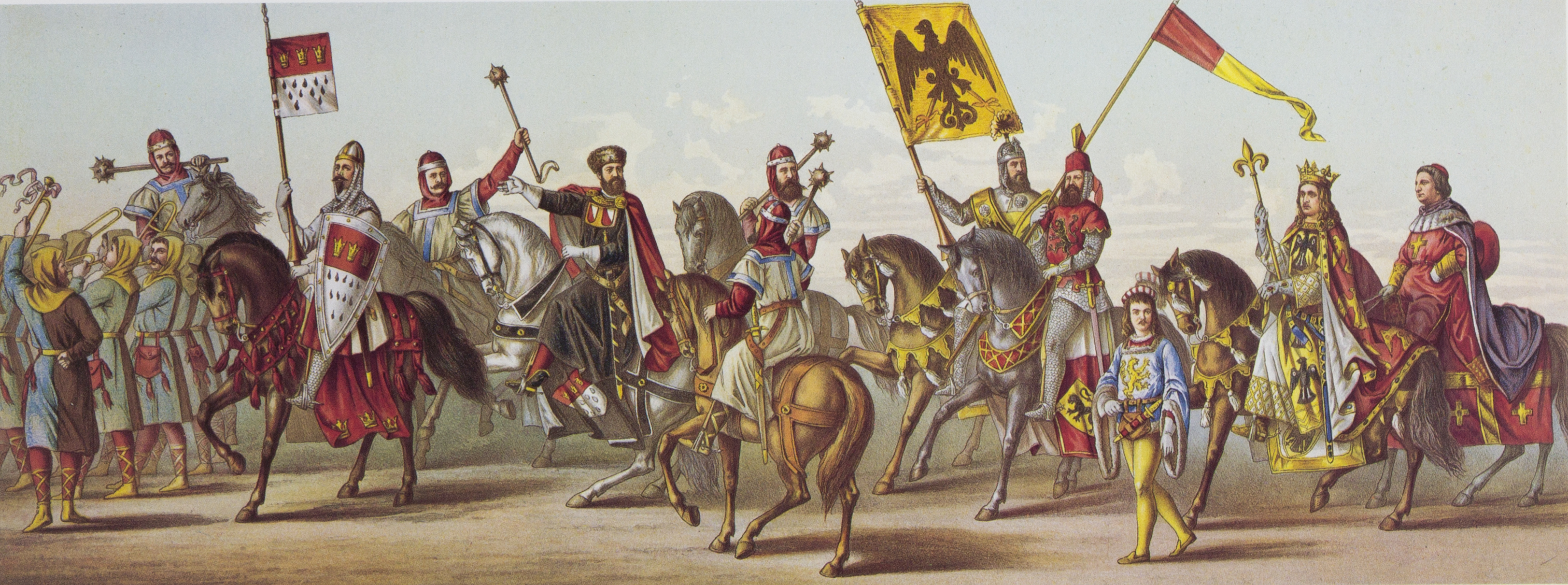 Tony Avenarius: Historischer Festzug veranstaltet bei der Feier der Vollendung des Kölner Doms am 18. October 1880. Tafel III